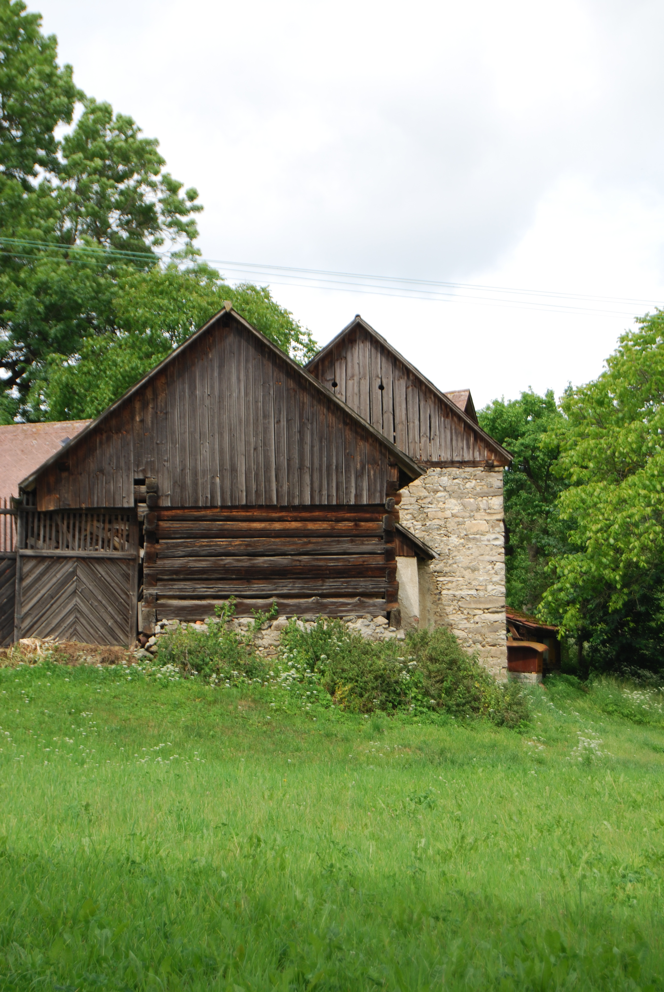 Voděrady je část obce Chyšky v okrese Písek. Česká republika.